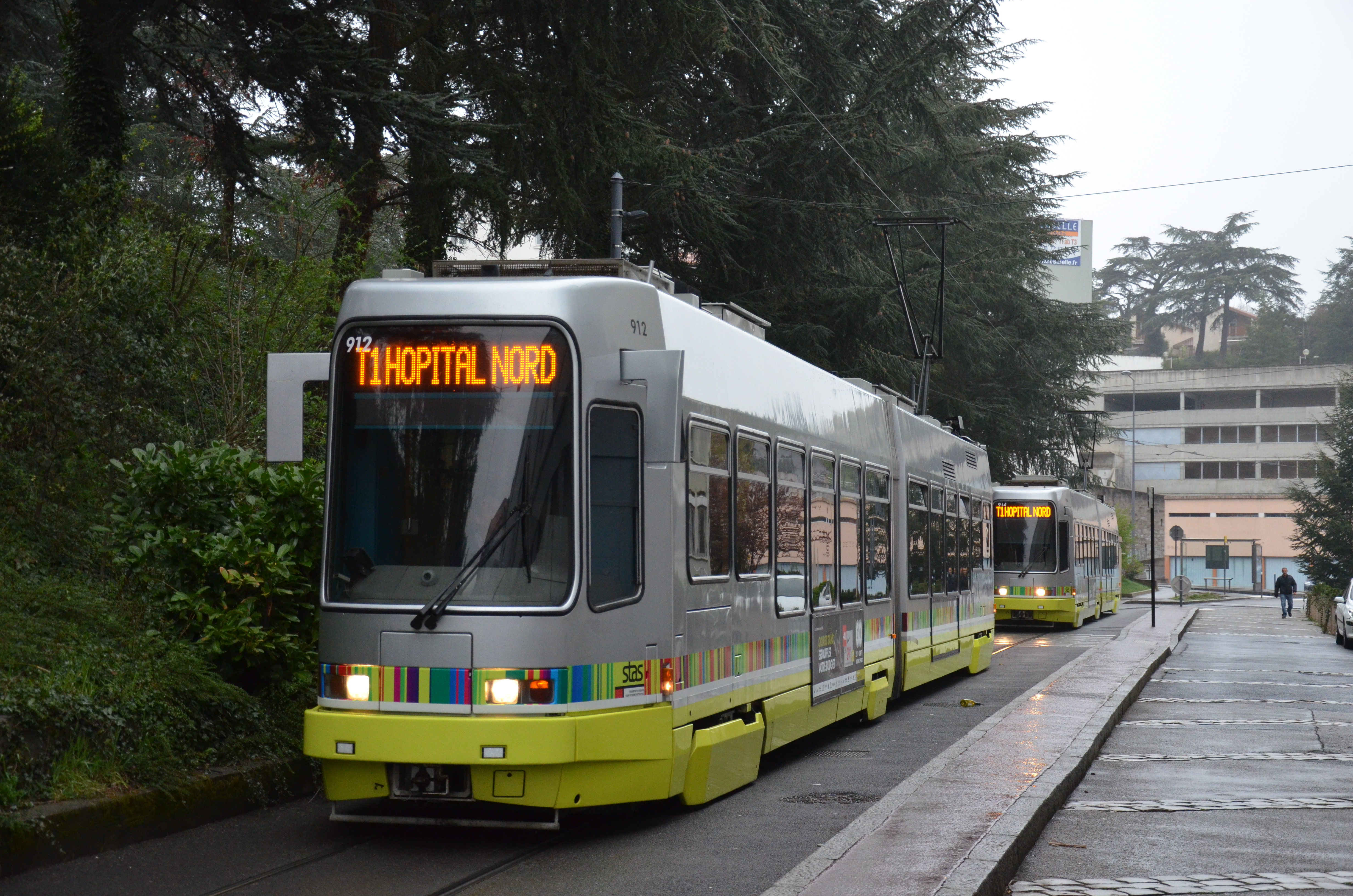 Alsthom Vevey Düwag n°914 sur la ligne T1 du réseau STAS de Saint-Étienne, à son terminus Solaure.